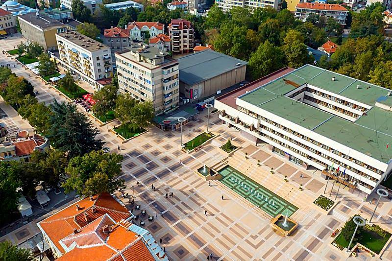 Обновения център